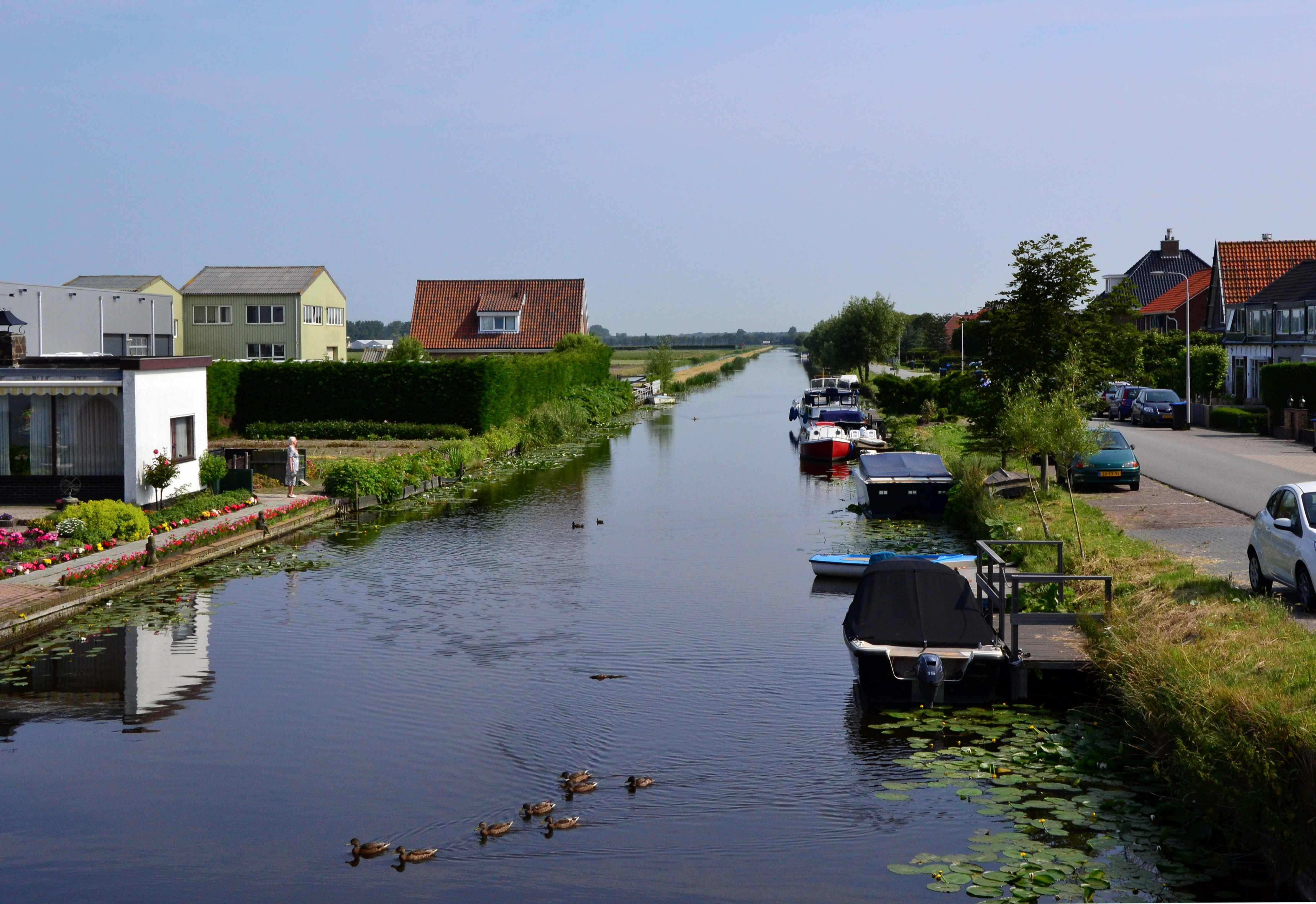 Die Haarlemmertrekvaart bei Noordwijkerhout, ist ein Kanal zwischen Amsterdam und Haarlem der bis nach Noordwijk führt